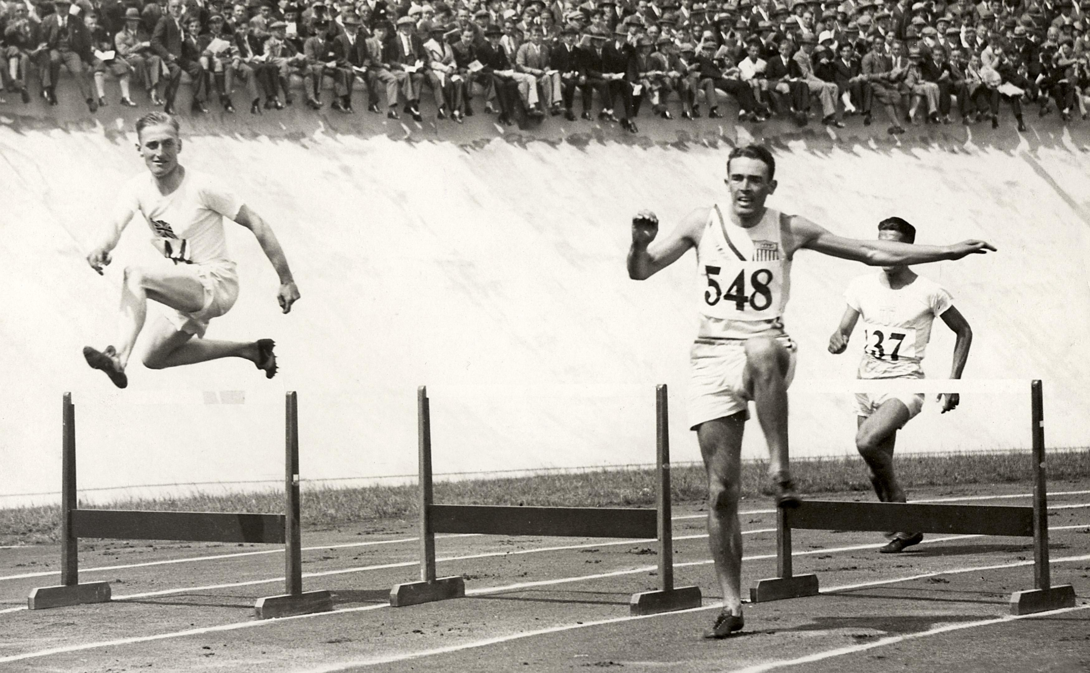 Sport. Olympische Spelen 1928 Amsterdam, Nederland : Opname uit de serie van de 400 m horden : Links de Brit Lord Burghley, rechts de Amerikaan Maxwell.